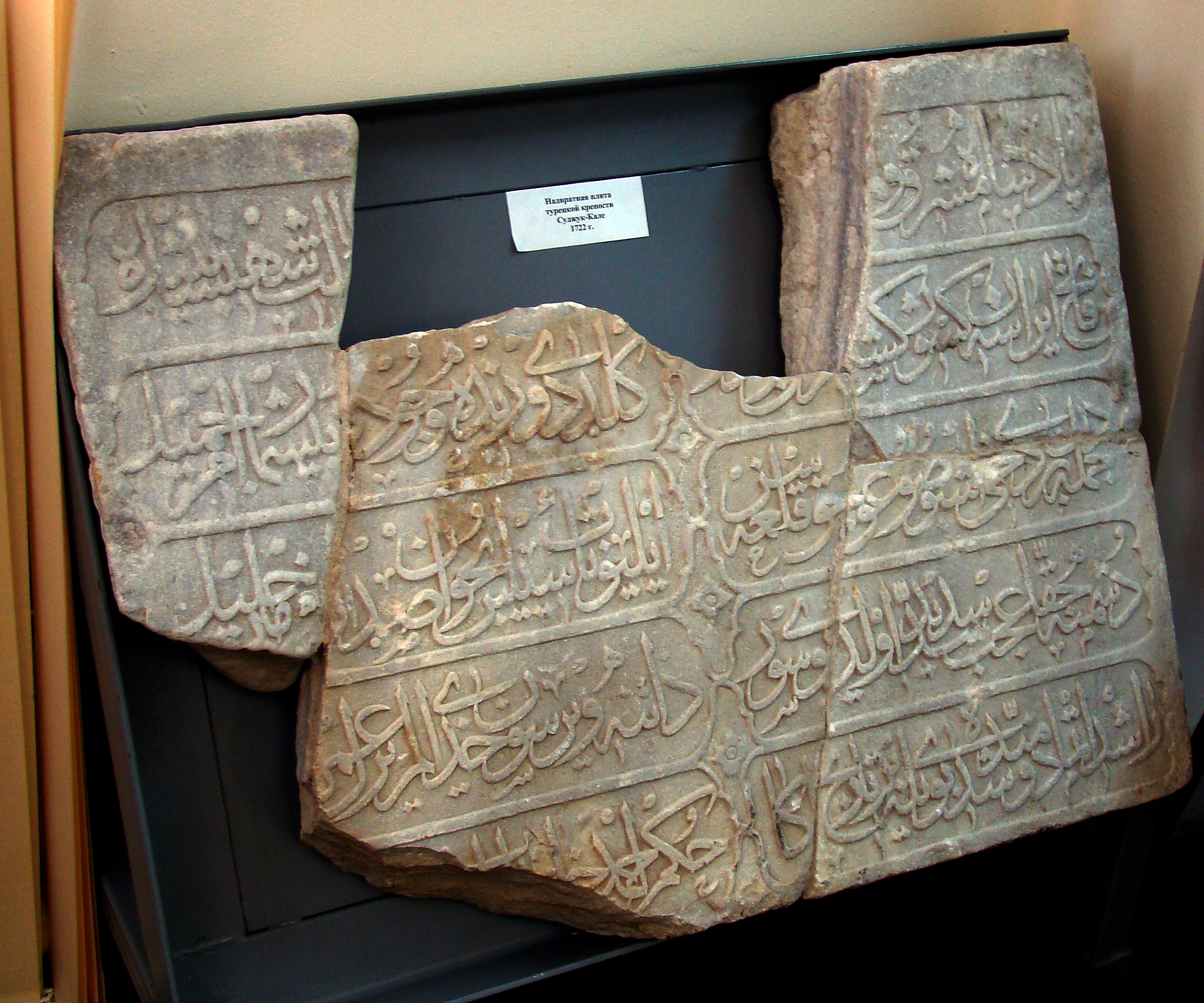 Надвратная плита турецкой крепости Суджук-Кале (Новороссийский городской музей)